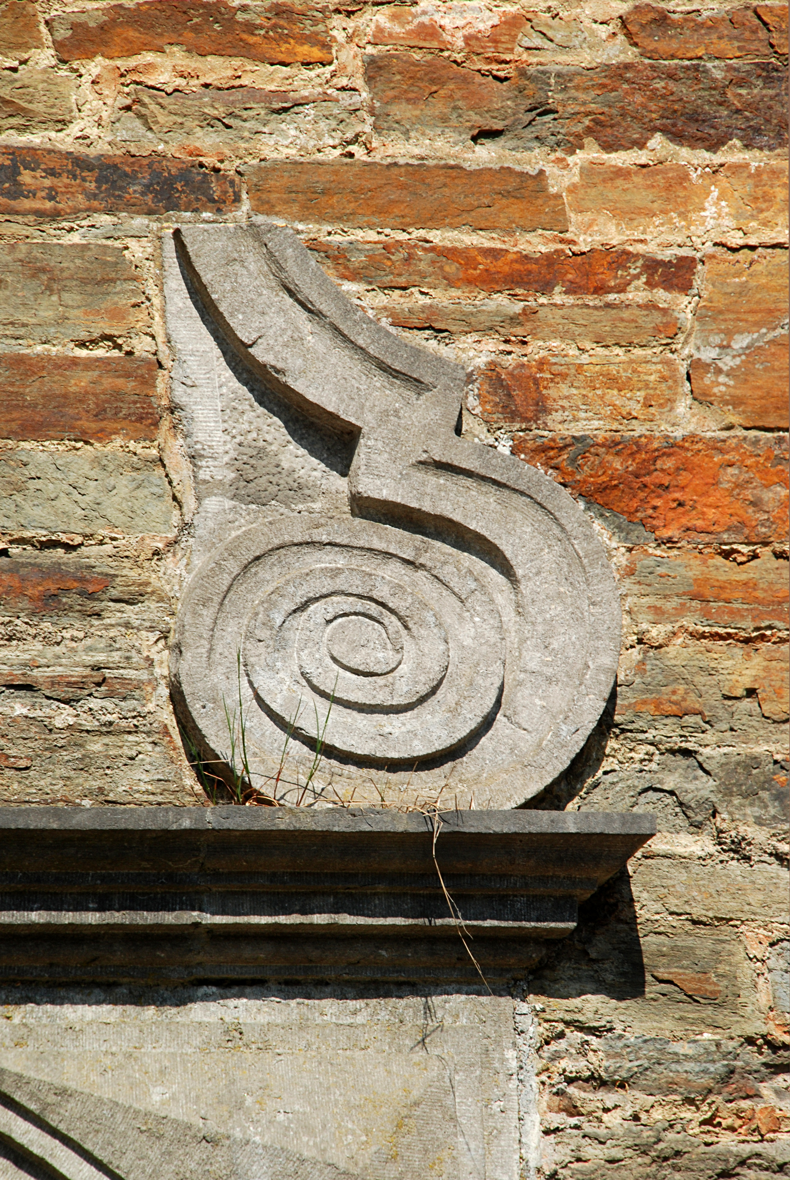 Belgique - Brabant wallon - Villers-la-Ville - Chapelle Saint-Bernard